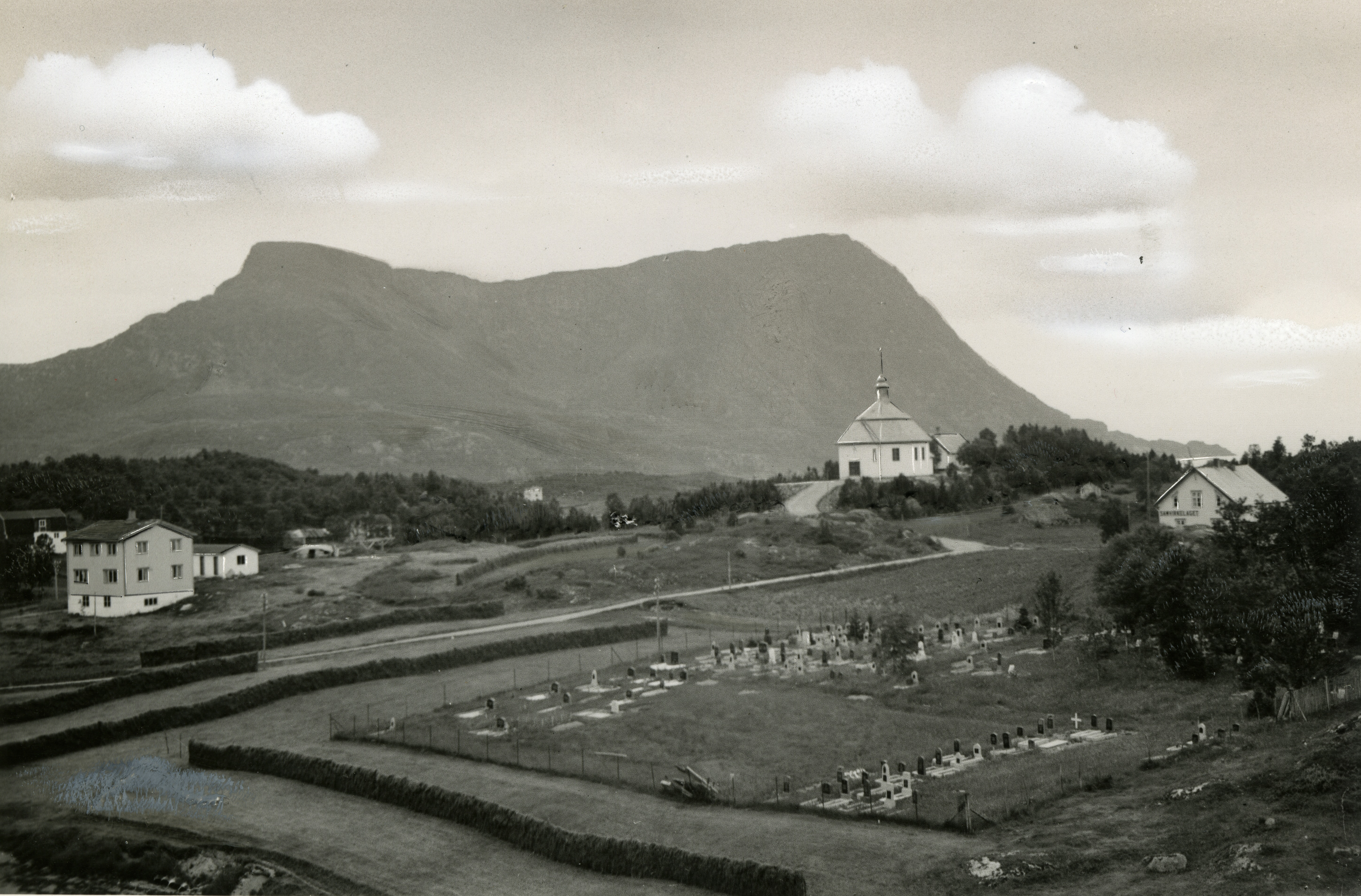 Bildet er hentet fra Nordlandsmuseet bildesamling etter Kanstad. Motivbeskrivelse: Digermulen Sted: Vågan, Digermulen